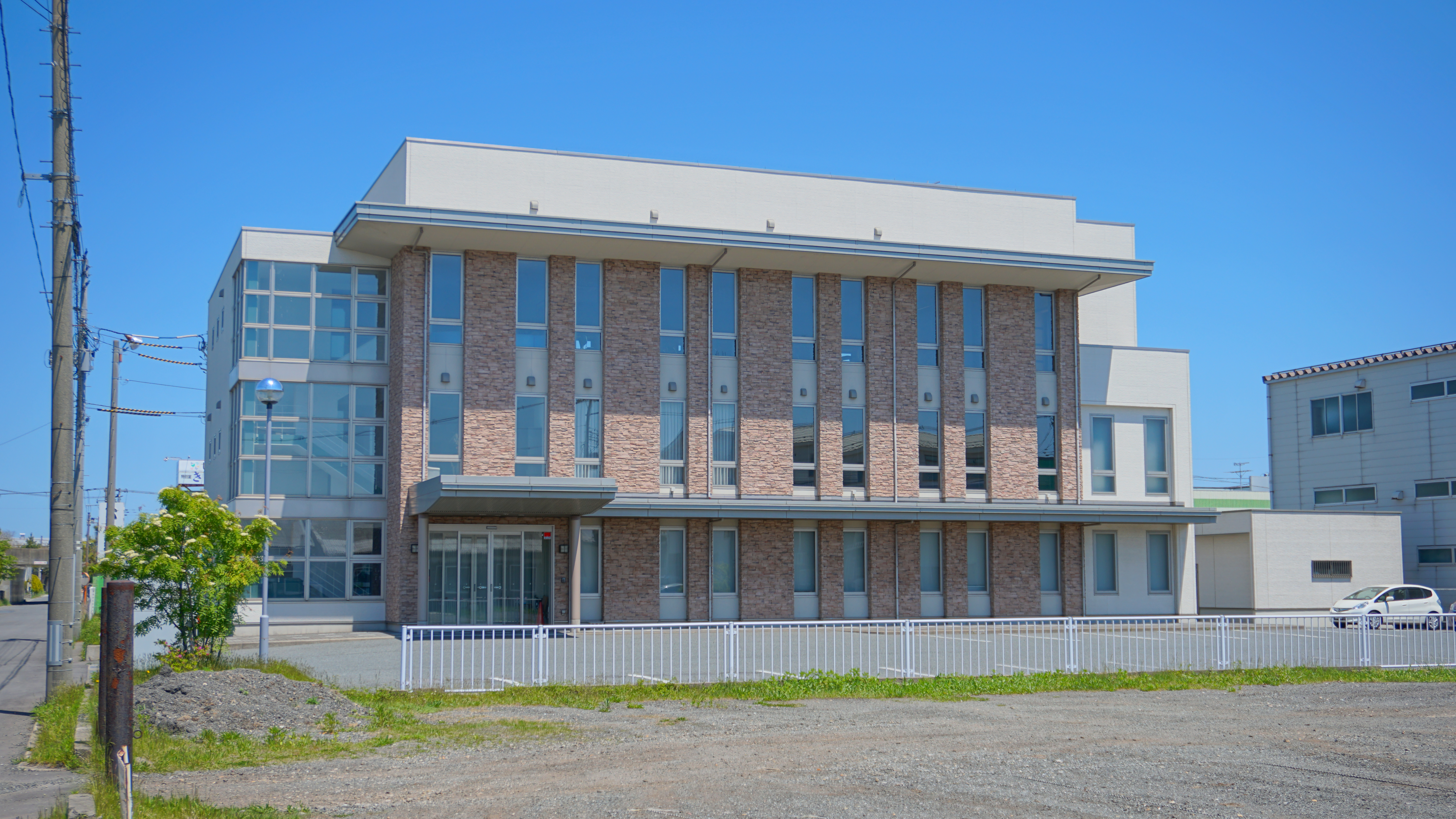 秋田県歯科医師会館（秋田市川尻町大川反）